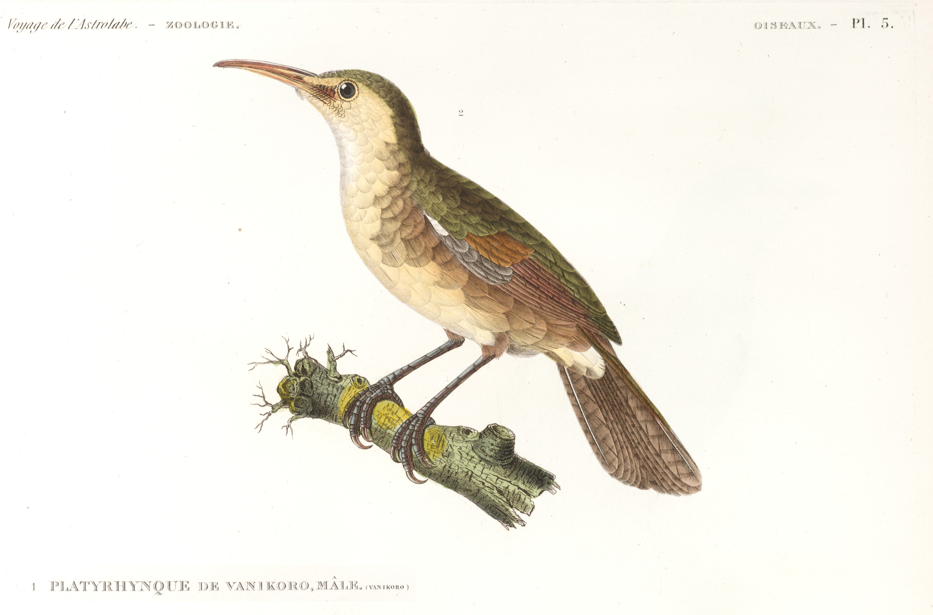 Platyrhynque de Vanikoro mâle, expédition Dumont d'Urville, 1833